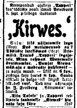 Kirwes kuulutus - ajalehes Säde 7 sept 1906